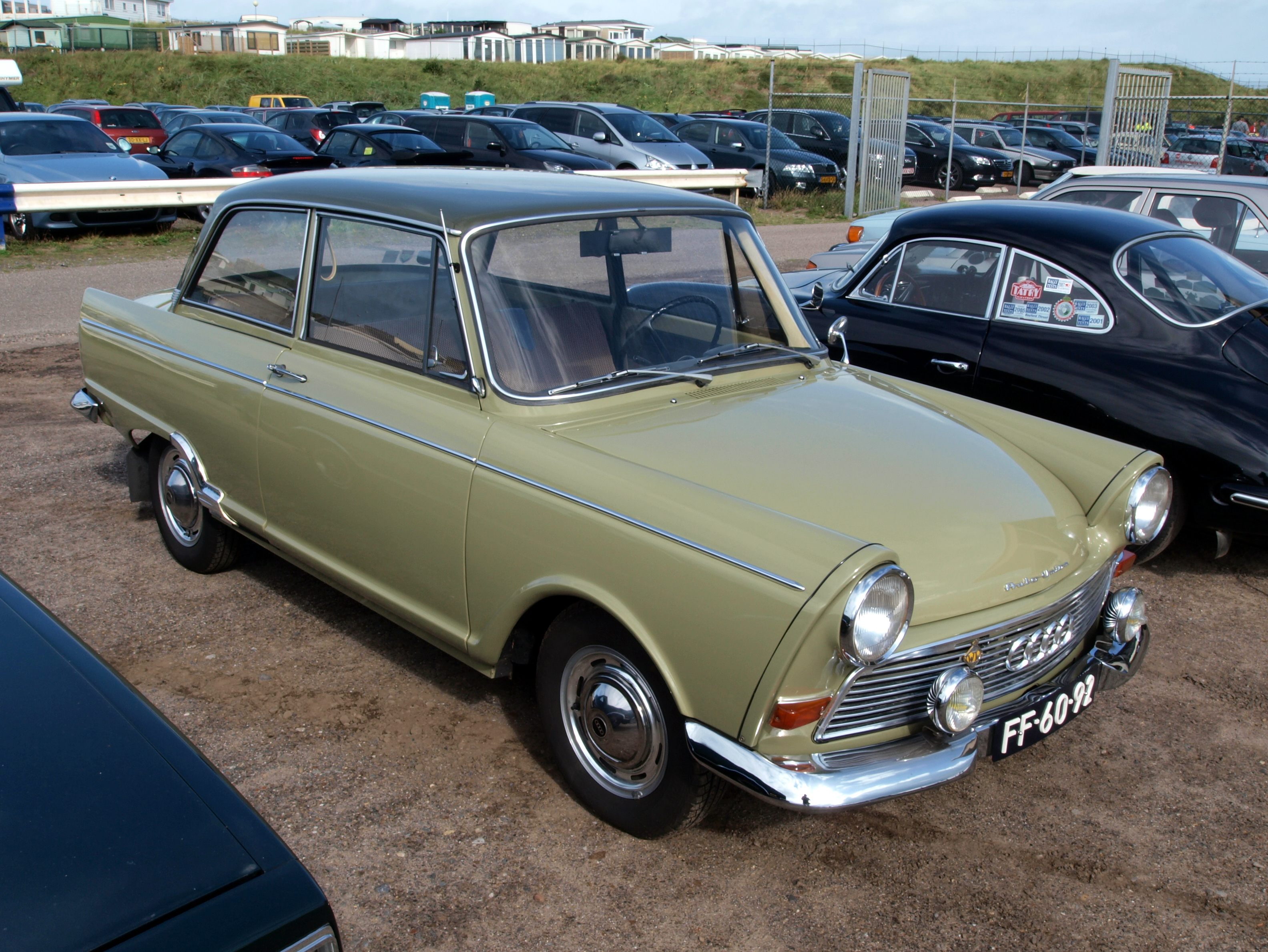 Nationaal Oldtimer Festival Zandvoort 2011.